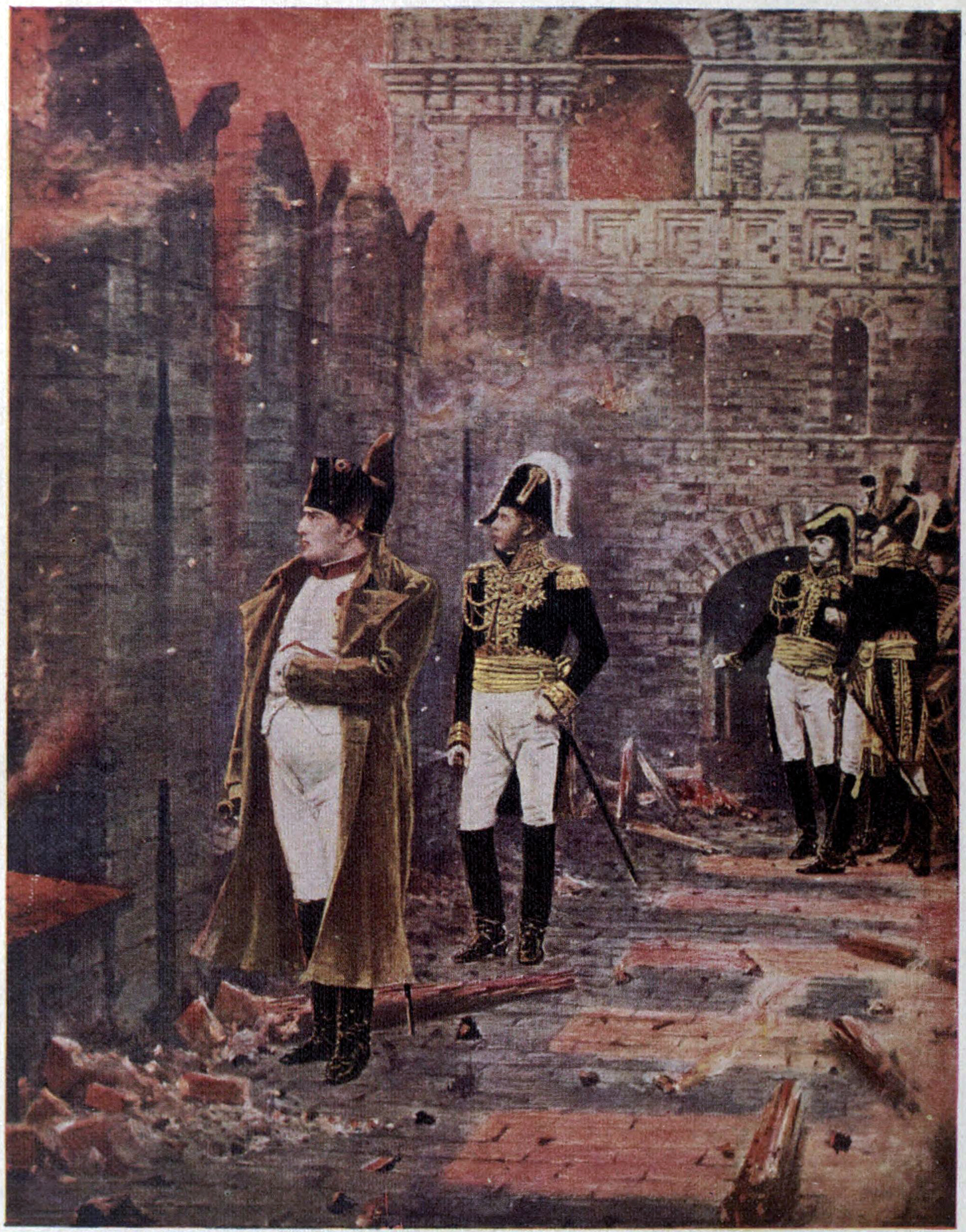 В. В. Верещагин. «В Кремле — пожар!». 1887—1898. Холст, масло. Государственный исторический музей, Москва.